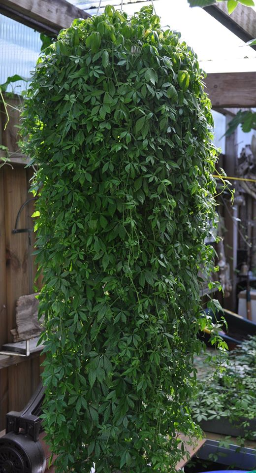 In einer Hängeampel können vegetativ vermehrte Jiaogulan-Pflanzen auch in Deutschland stattliche Längen erreichen.